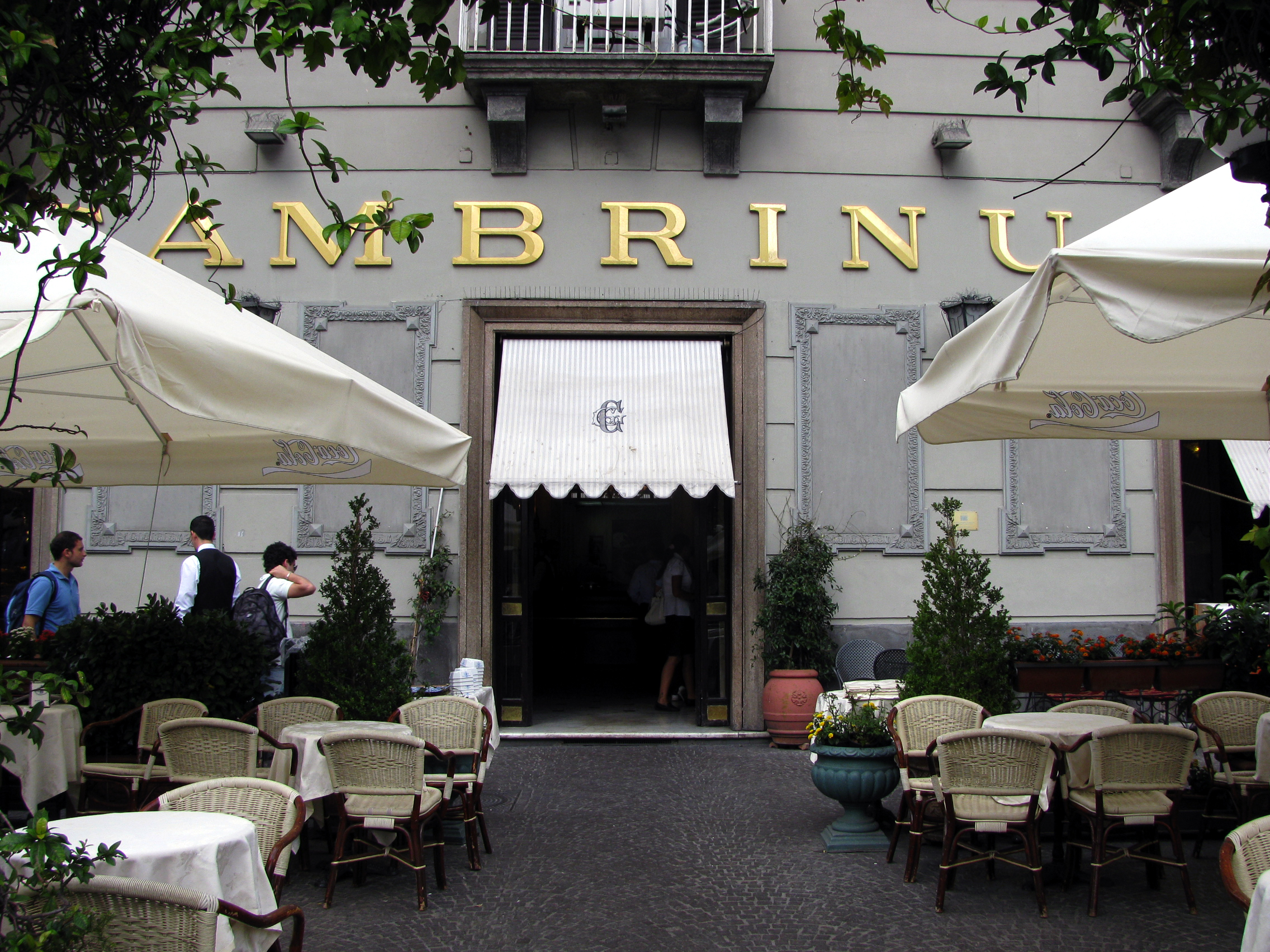 Caffè Gambrinus in Napoli - Italia.